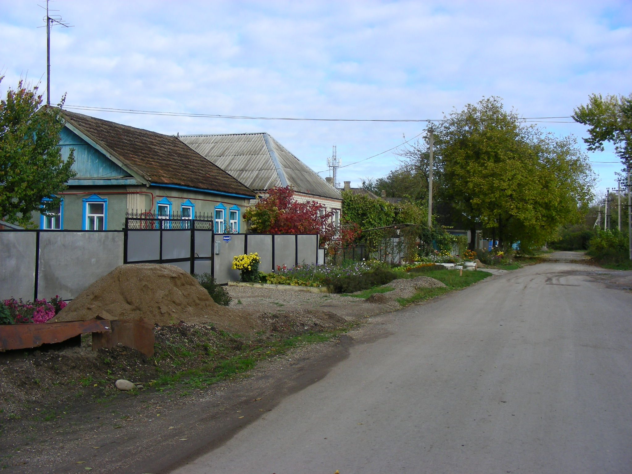 Зольская.ул.Багатенская.